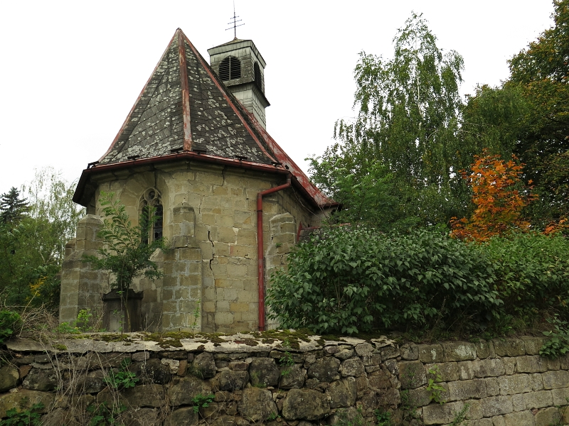 Kostel svatých Šimona a Judy, východní část vsi, při zámku, Vlčí Pole.